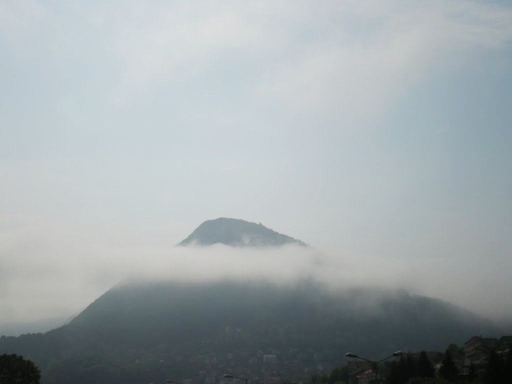 Brdo Orugla, opština Mrkonjić Grad.